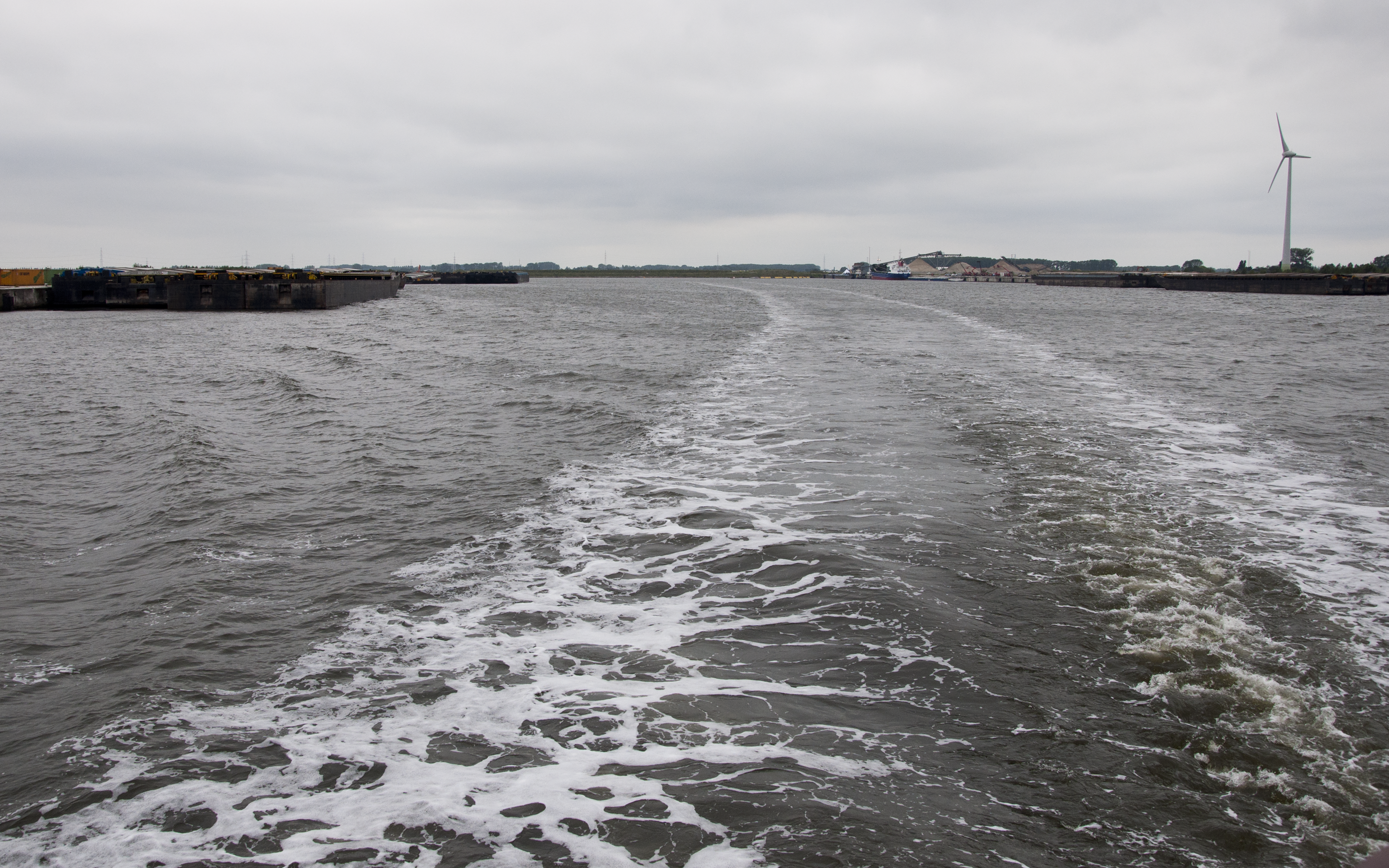 Het Kluizendok, Haven van Gent, België